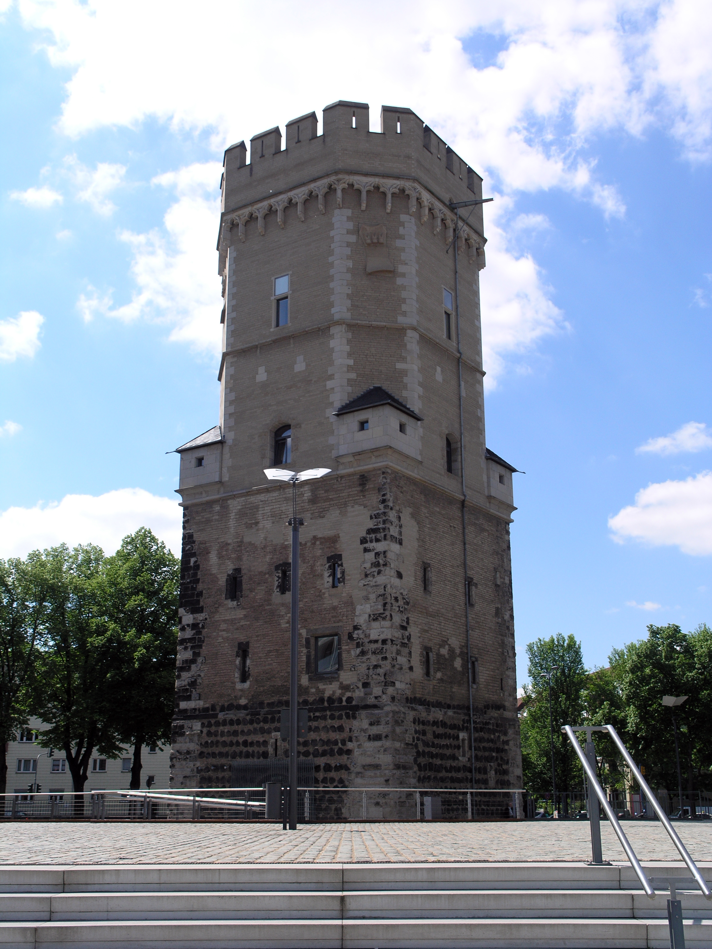 Северный Рейн-Вестфалия, Кёльн - башня Bayenturm